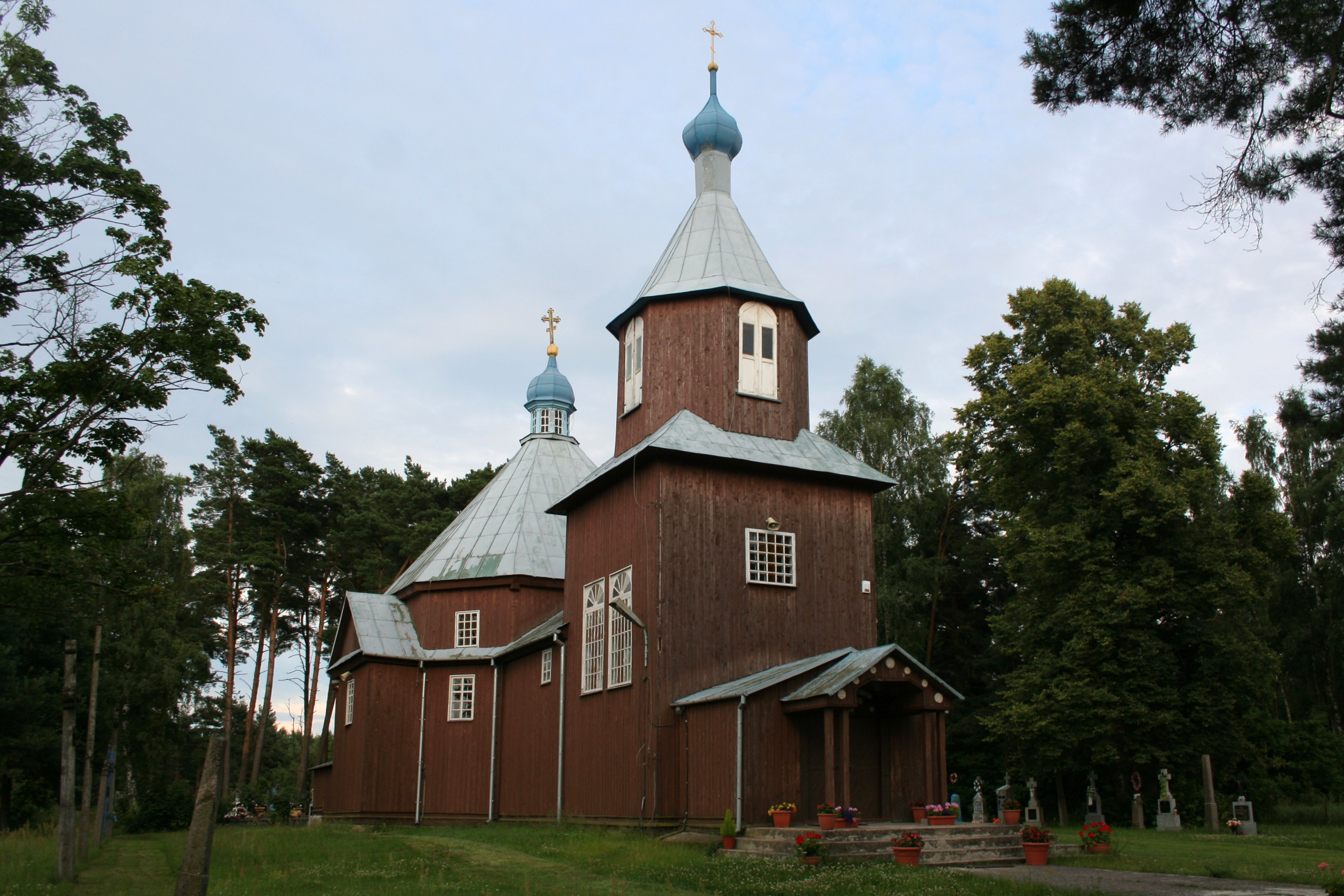 Cerkiew św. Antoniego Peczerskiego w Kuraszewie.